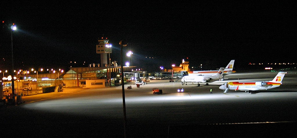 Aeroporto de Vigo pola noite*